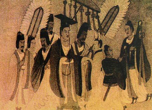 北魏孝文帝像